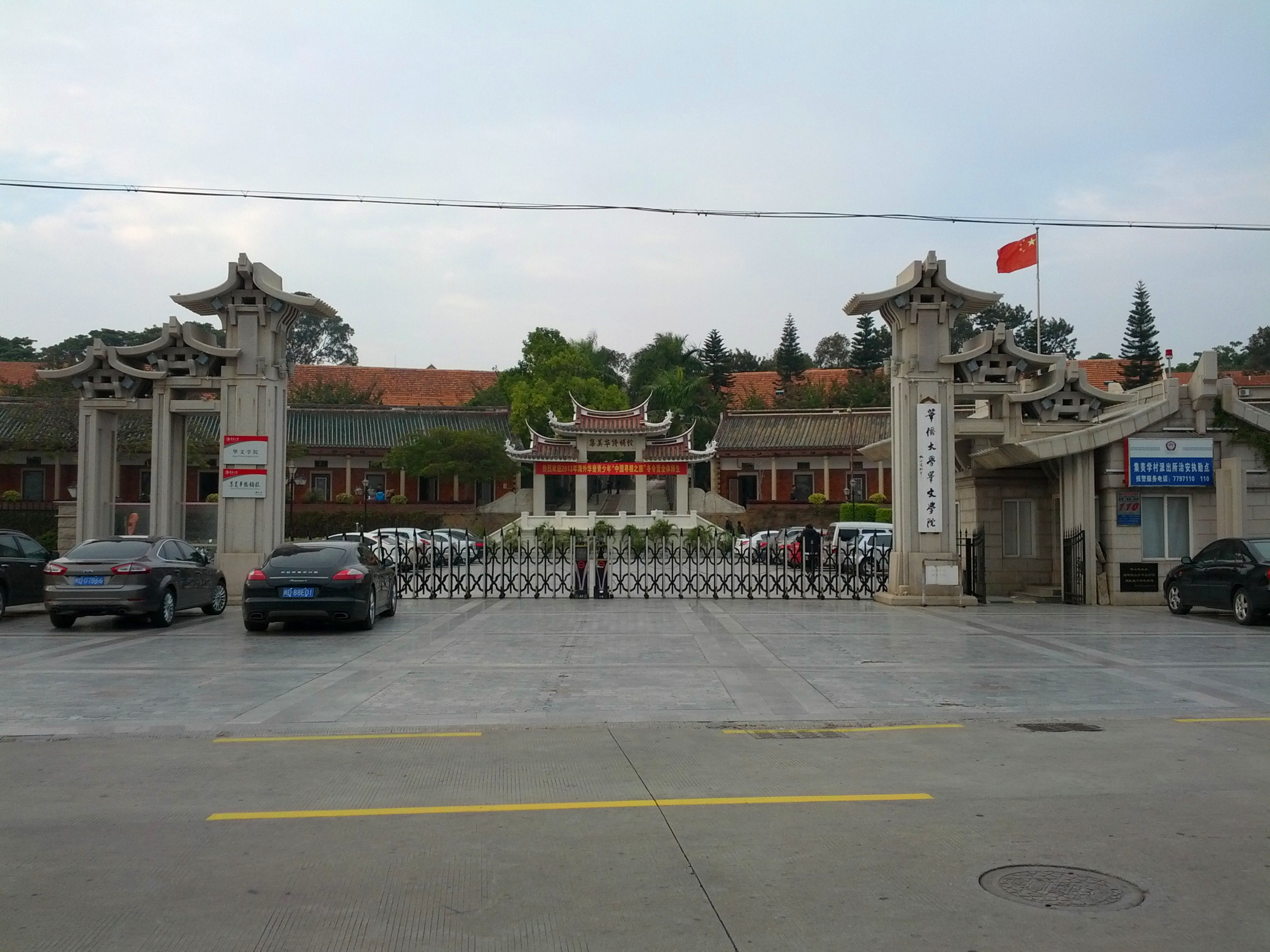 中文（中国大陆）: 华侨大学华文学院大门